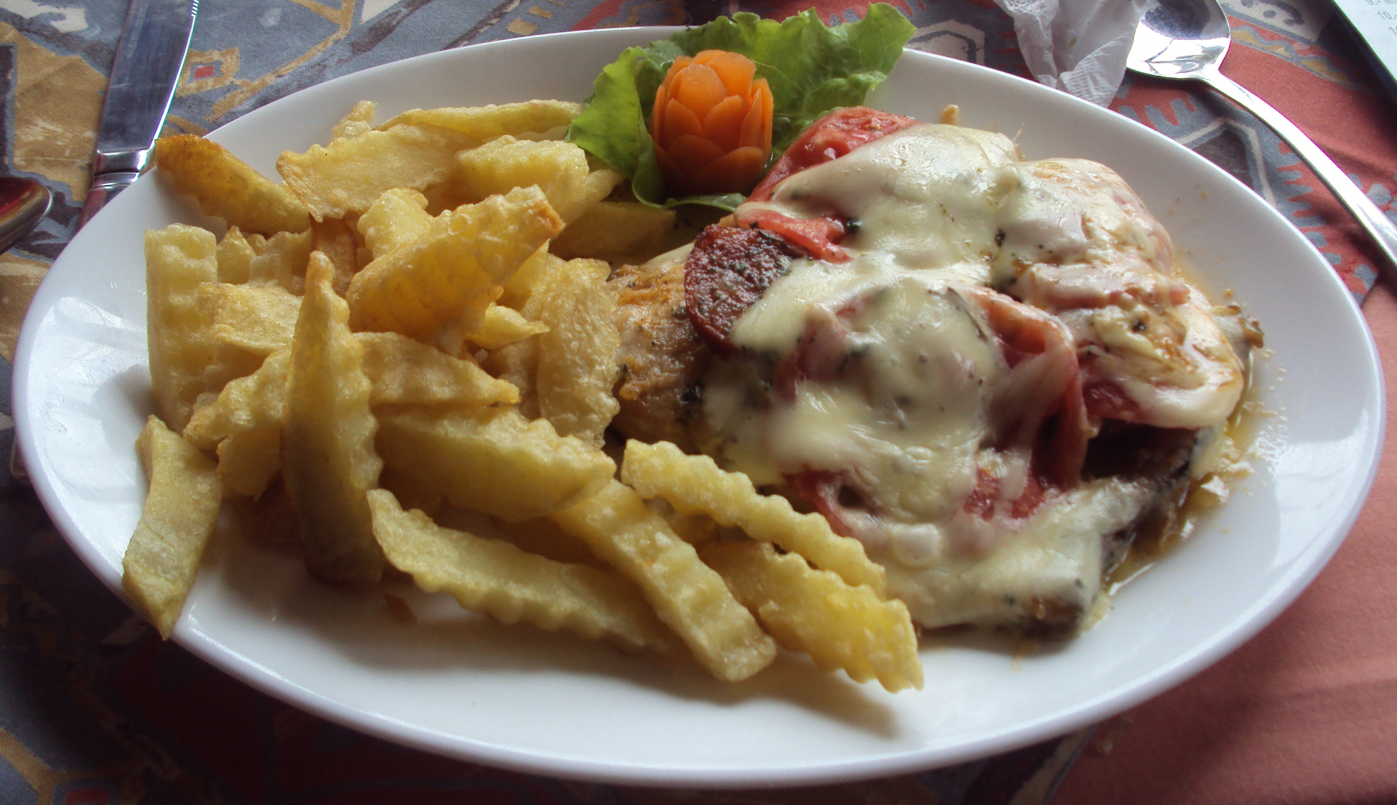 Cancato de sierra chilote